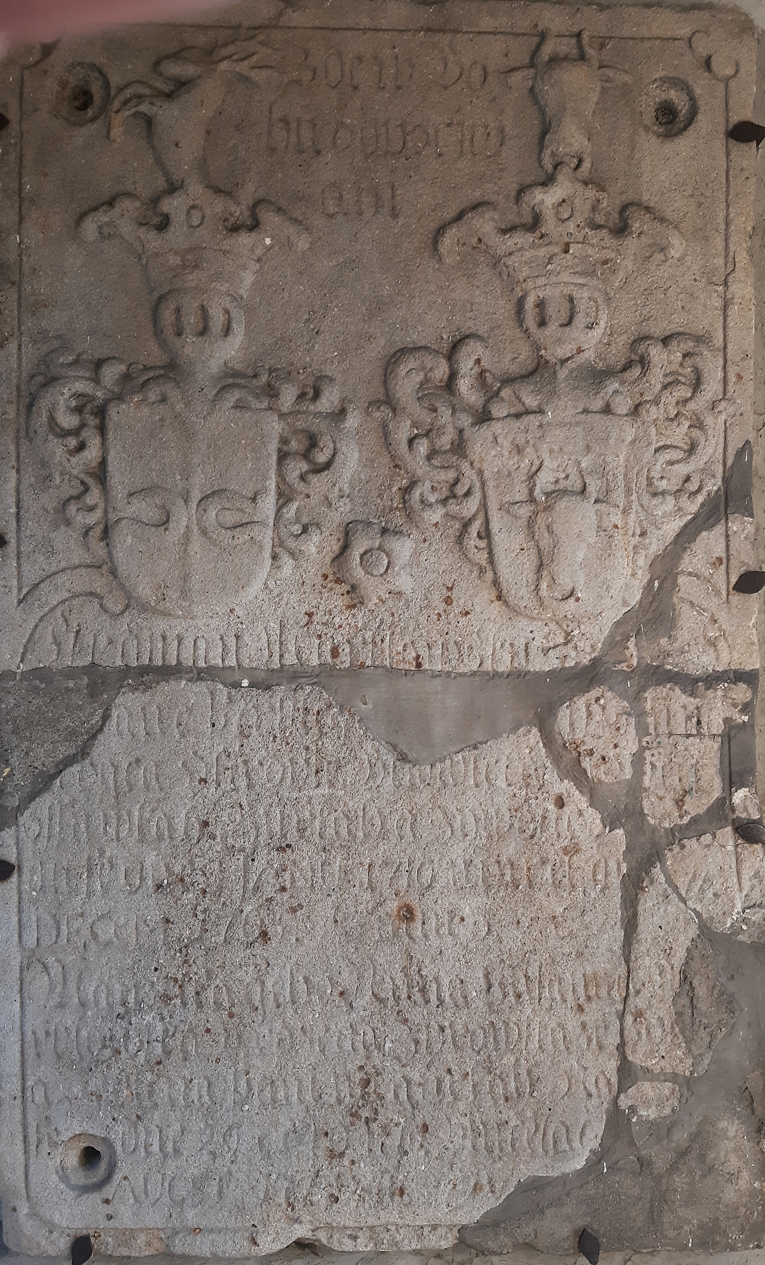 Nagrobek Erdmanna Marklowskiego z Żebraczy i Pernsteinu (1710-1765) [herb Wieniawa] i jego żony Anny Żyrowskiej z Żyrowa (1719-1773) [herb Czewoja] w kościele w Górkach Wielkich